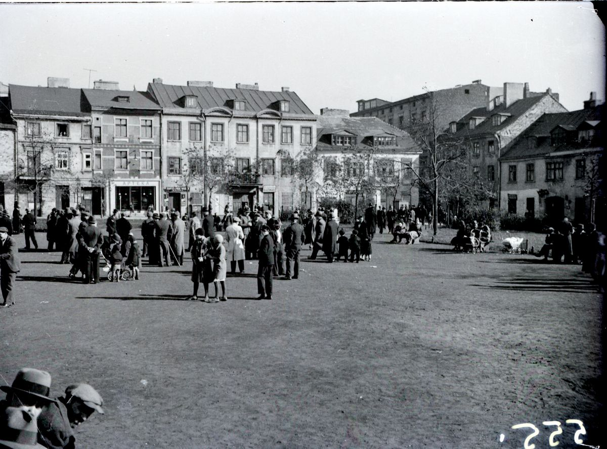 Widok Starego Rynku